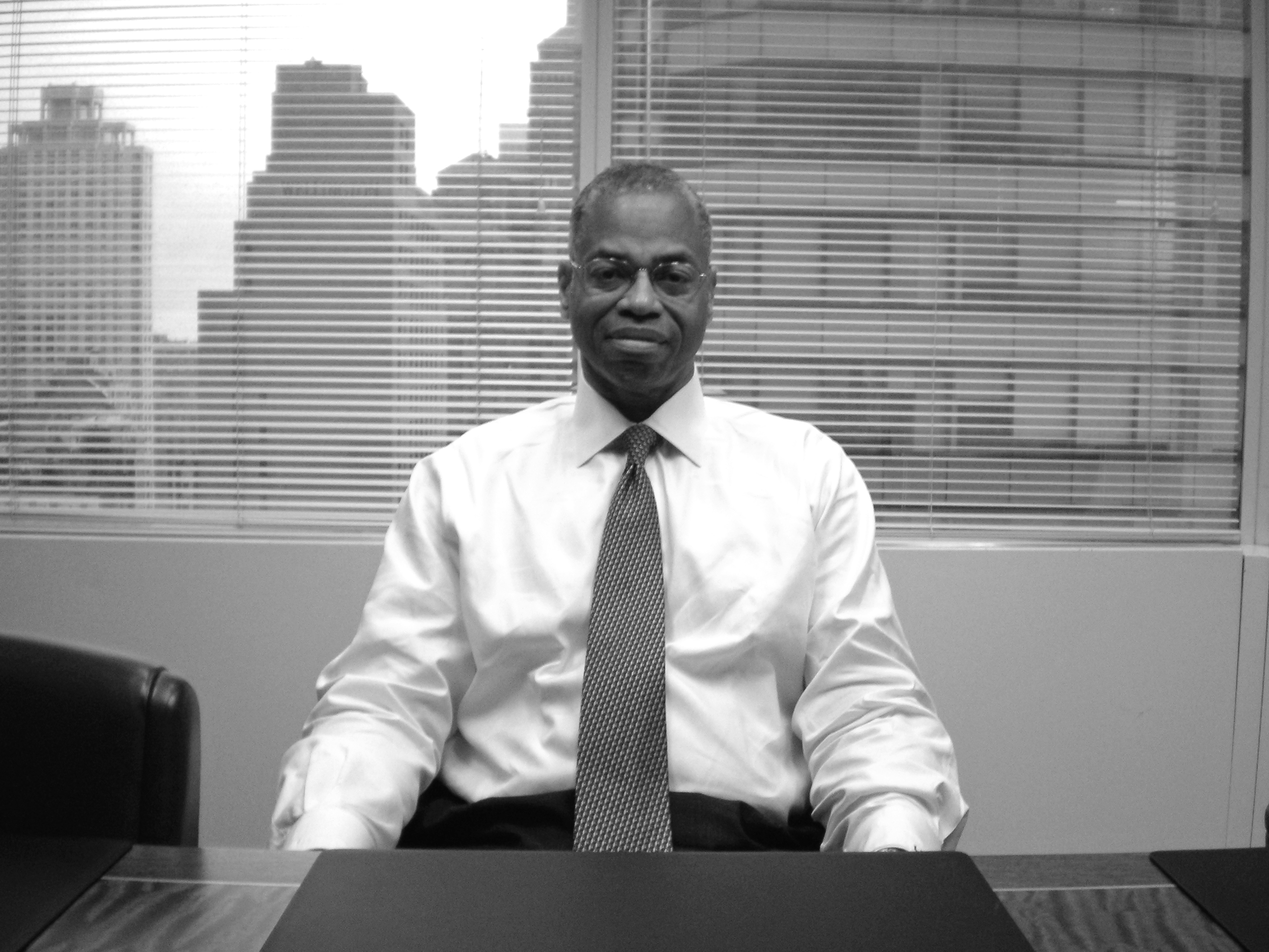 Len Elmore, attorney